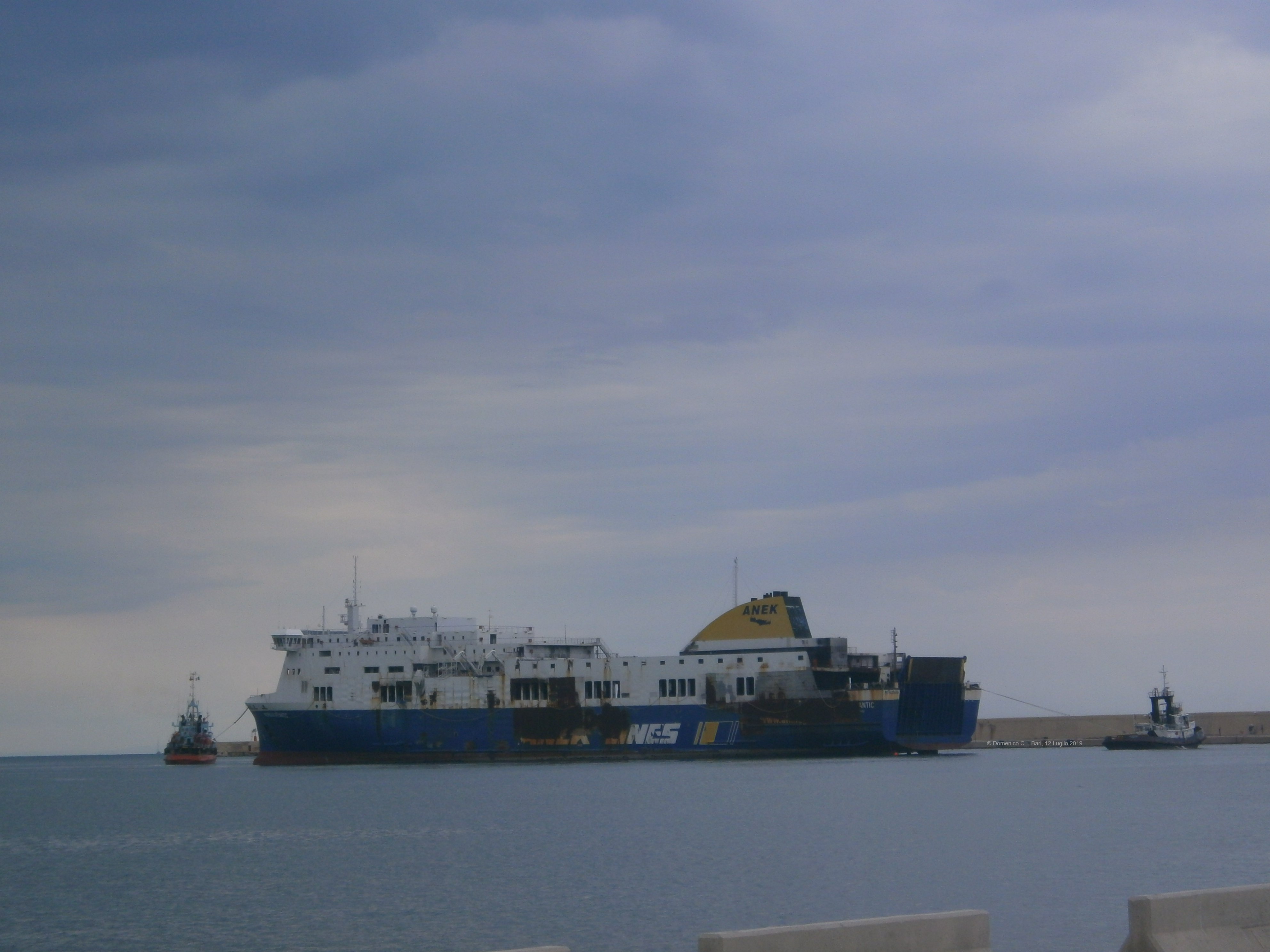 il traghetto Norman Atlantic, lascia il porto di Bari